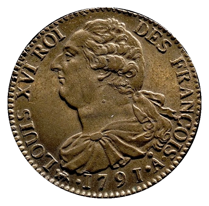 Pièce de 2 sols Louis XVI constitutionnel. Atelier Paris, 1791. Diamètre 32 à 37 mm, poids 24,47 gr (cet exemplaire 19,90 gr), cuivre ou bronze. Tranche lisse.